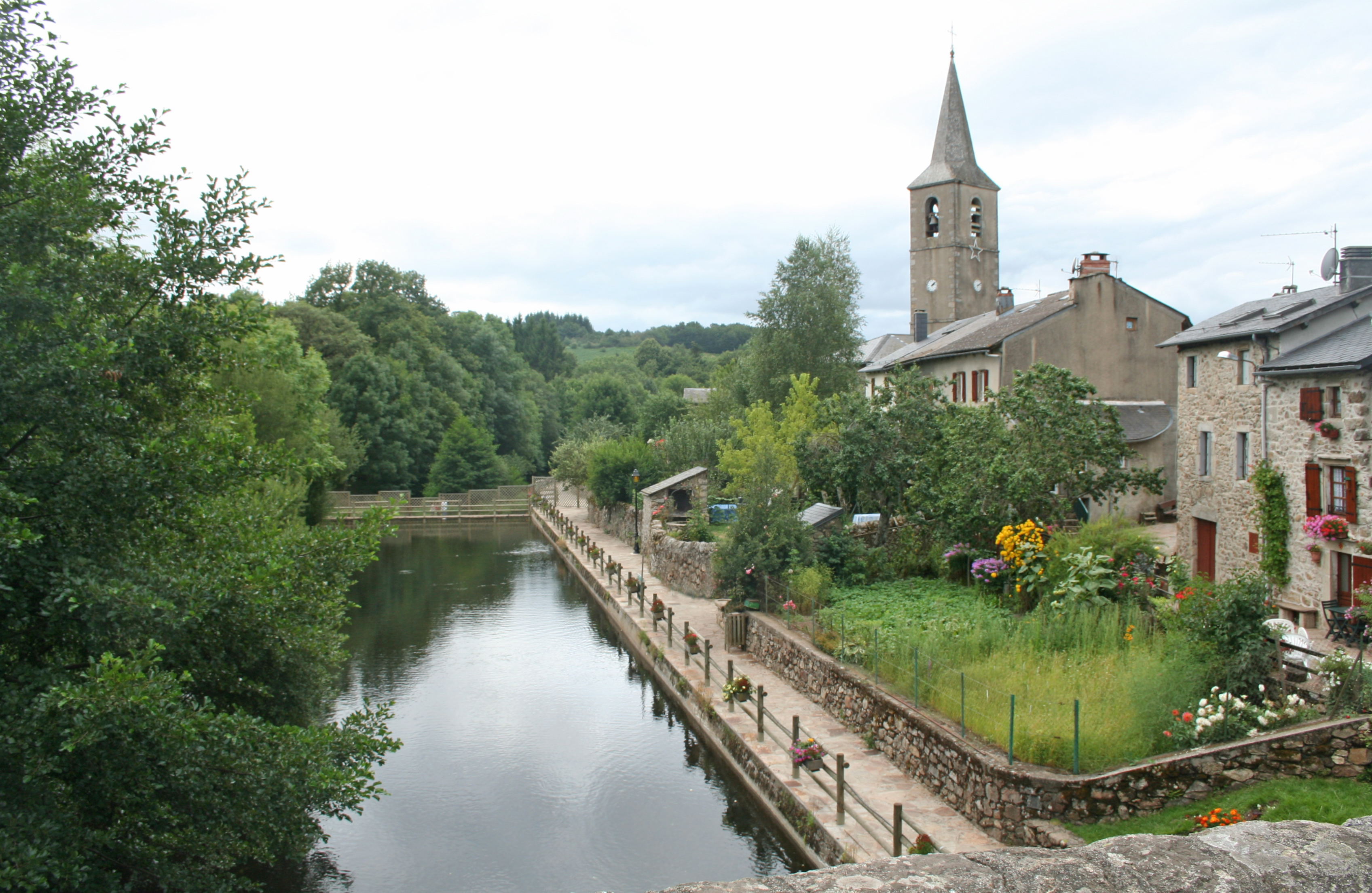 Fraisse-sur-Agout (Hérault) - l'Agout, le village, le clocher de Saint-Jean-Baptiste.